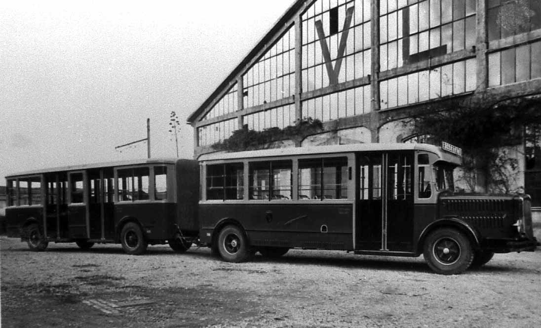 Autobus ATAC di tipo sperimentale degli anni '30